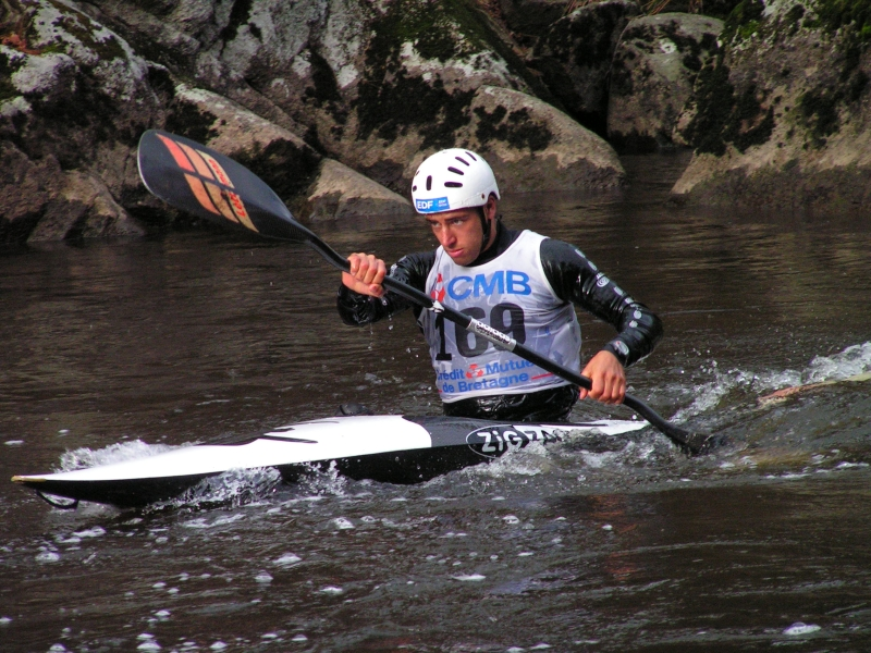 Le kayakiste français Fabien Lefèvre lors des Eurolympiques 2005 (compétition de canoë-kayak slalom)